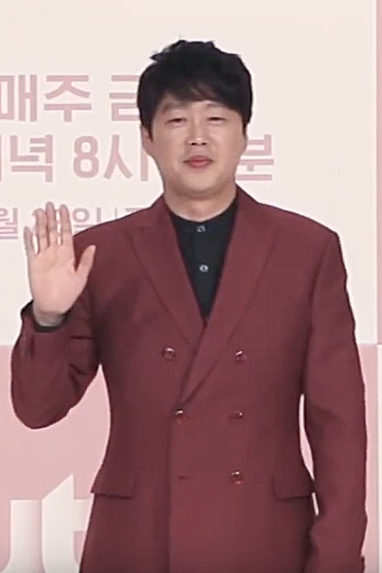 [TV10] 10월 26일 Jtbc '이번주 아내가 바람을 핍니다' 제작발표회 현장